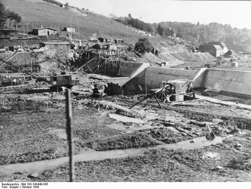 Westwall, Bau von Panzergräben ADN-ZB/Archiv Das faschistische Deutschland am Vorabend des II. Weltkrieges 1939/45 Bau der deutschen Westbefestigungen (Westwall) Oktober 1938: Baustellen für Panzerabwehrgräben durchziehen ein Tal in seiner ganzen Breite. Aufnahme: Gutjahr [Scherl Bilderdienst]